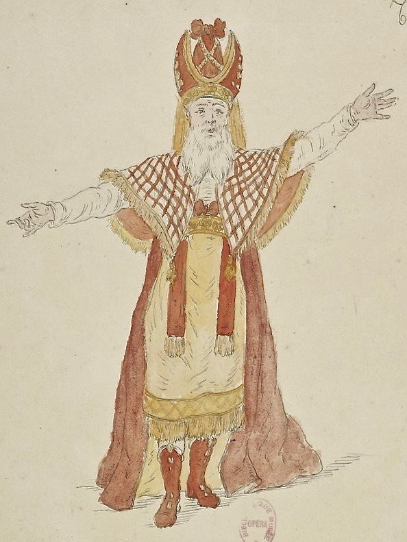 Unbekannter Künstler: Kostümentwurf für Arthénée, Hohepriester von Brahma, in der Oper "Tarare" von Antonio Salieri (1750–1825) und Pierre-Augustin Caron de Beaumarchais (1732–1799), Paris 1787. Bibliothèque nationale de France.